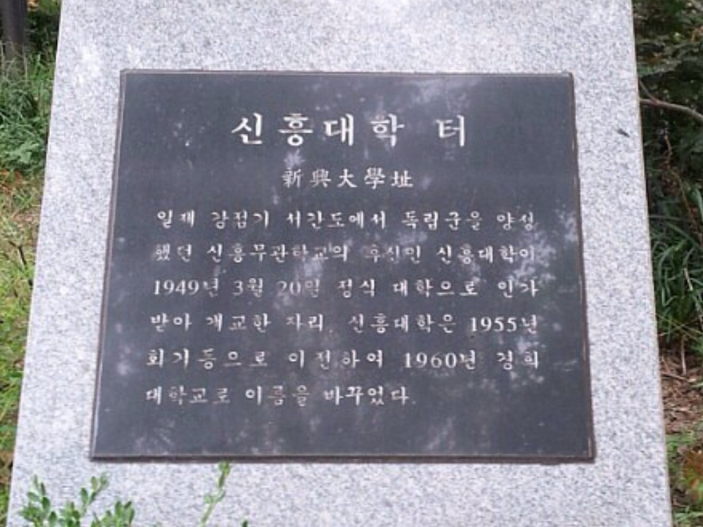 신흥무관학교가 해방 후 신흥대학을 새운 자리